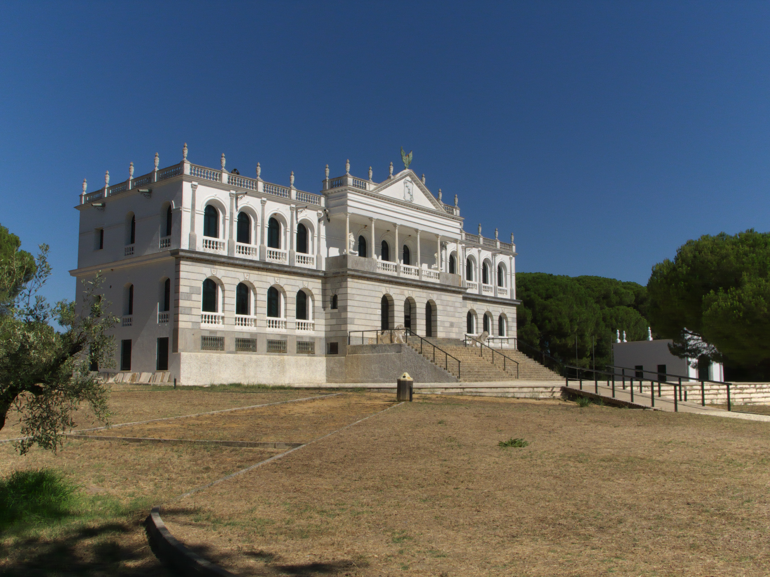 Sorprendente edificación en el Arroyo de la Rocina. Promovida por Luis Espinosa Fontdevilla para residencia y centro de caza